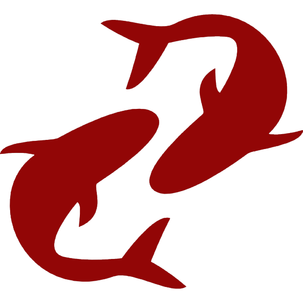 Symbole du signe astrologique des poissons